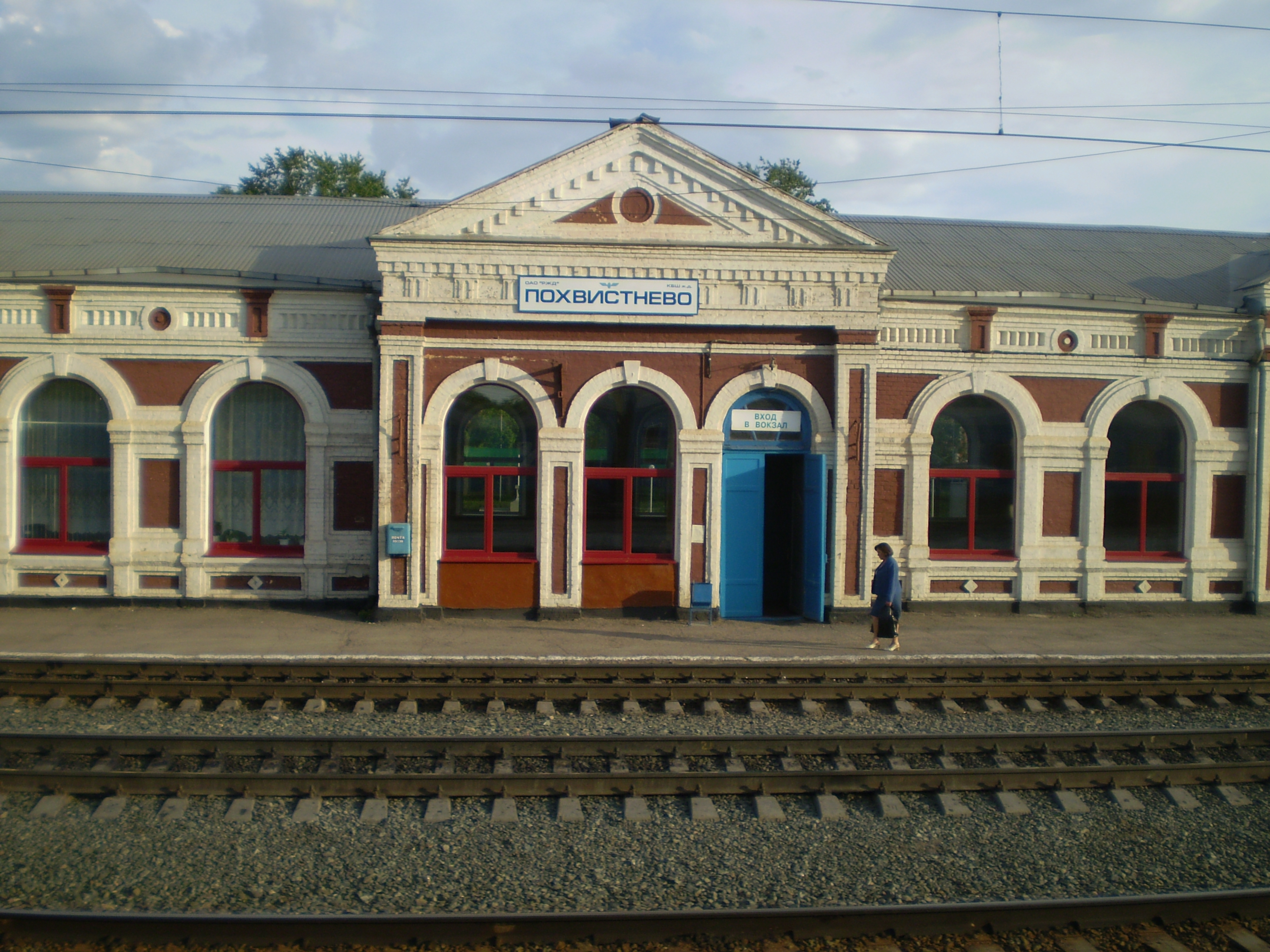 Станция Похвистнево Куйбышевской железной дороги